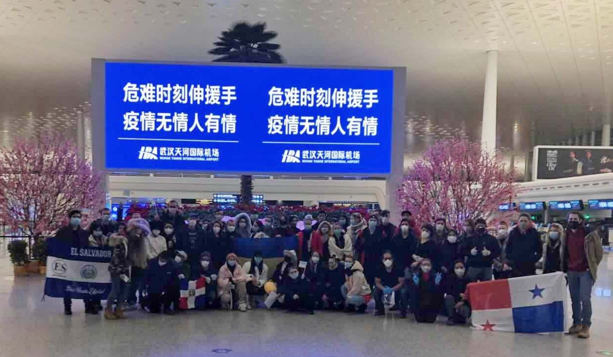 Евакуація громадян України та іноземців з провінції Хубей